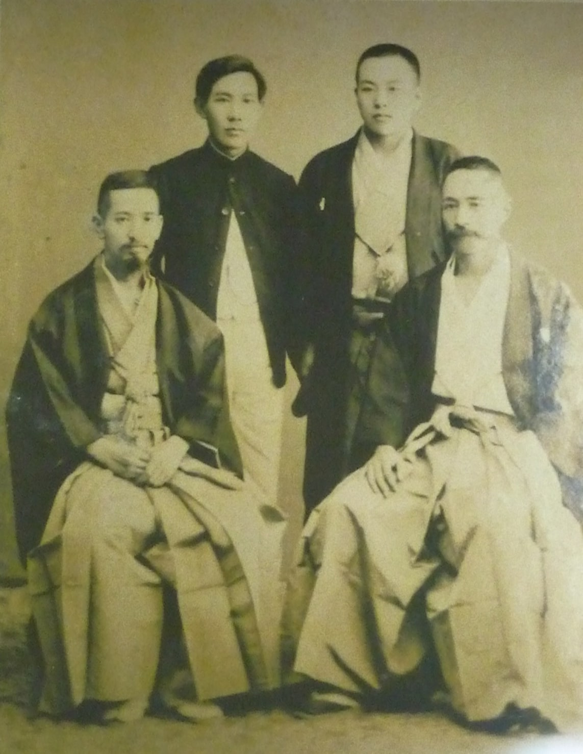 夏目漱石英国留学前の送別記念写真 前列右が漱石、前列左が奥太一郎、後列左が遠山参良、後列右が木村鎮太（？） 東京都品川区の串田武彦氏所有